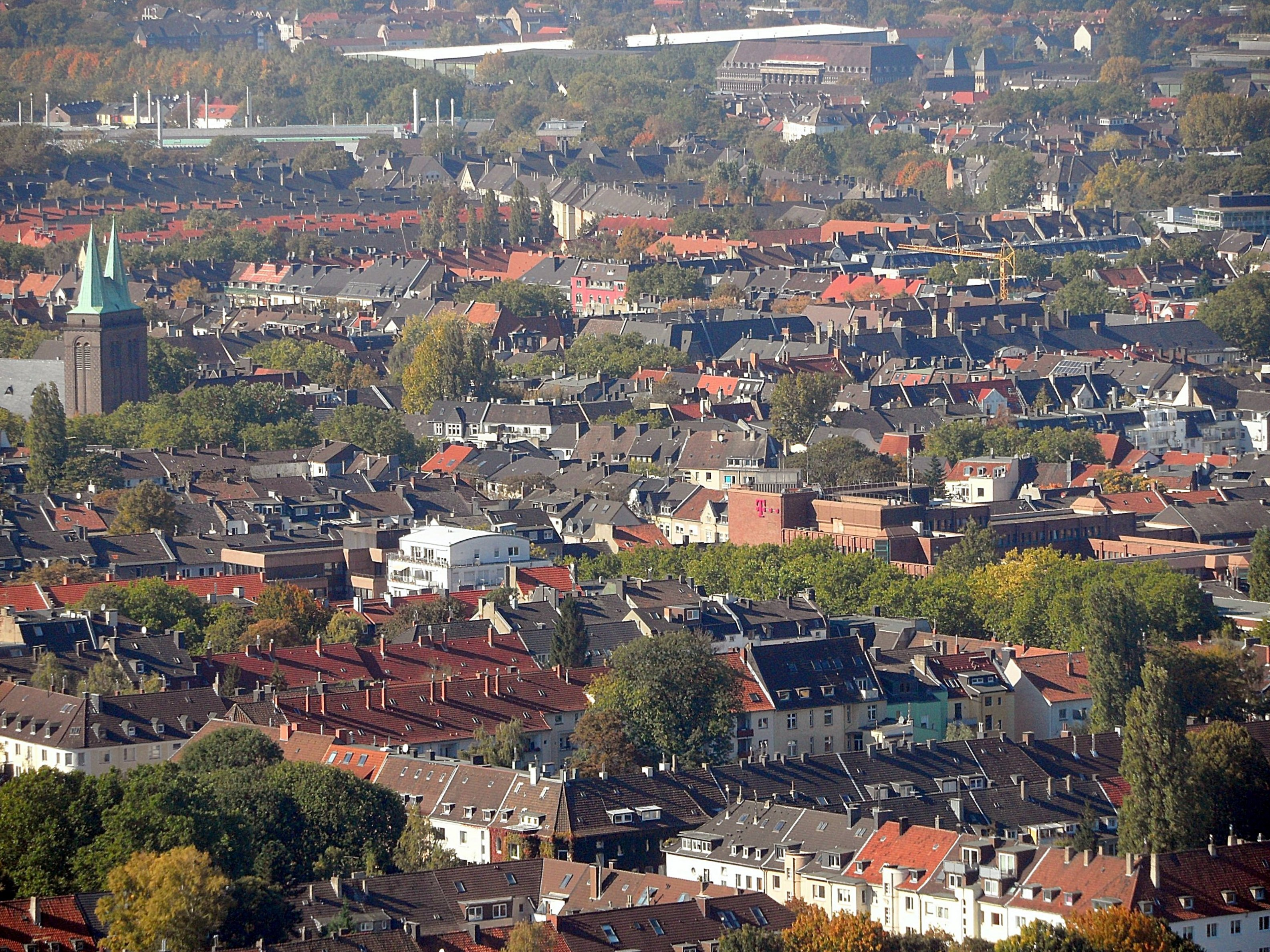 Kreuzviertel (vorn), Althoffblock (Zentrum oben) und Bezirk Dorstfelder Brücke mit Ex-Hoeschzentrale und Kirche St. Anna (oben Bildrand); von Florianturm; Oktober 2015